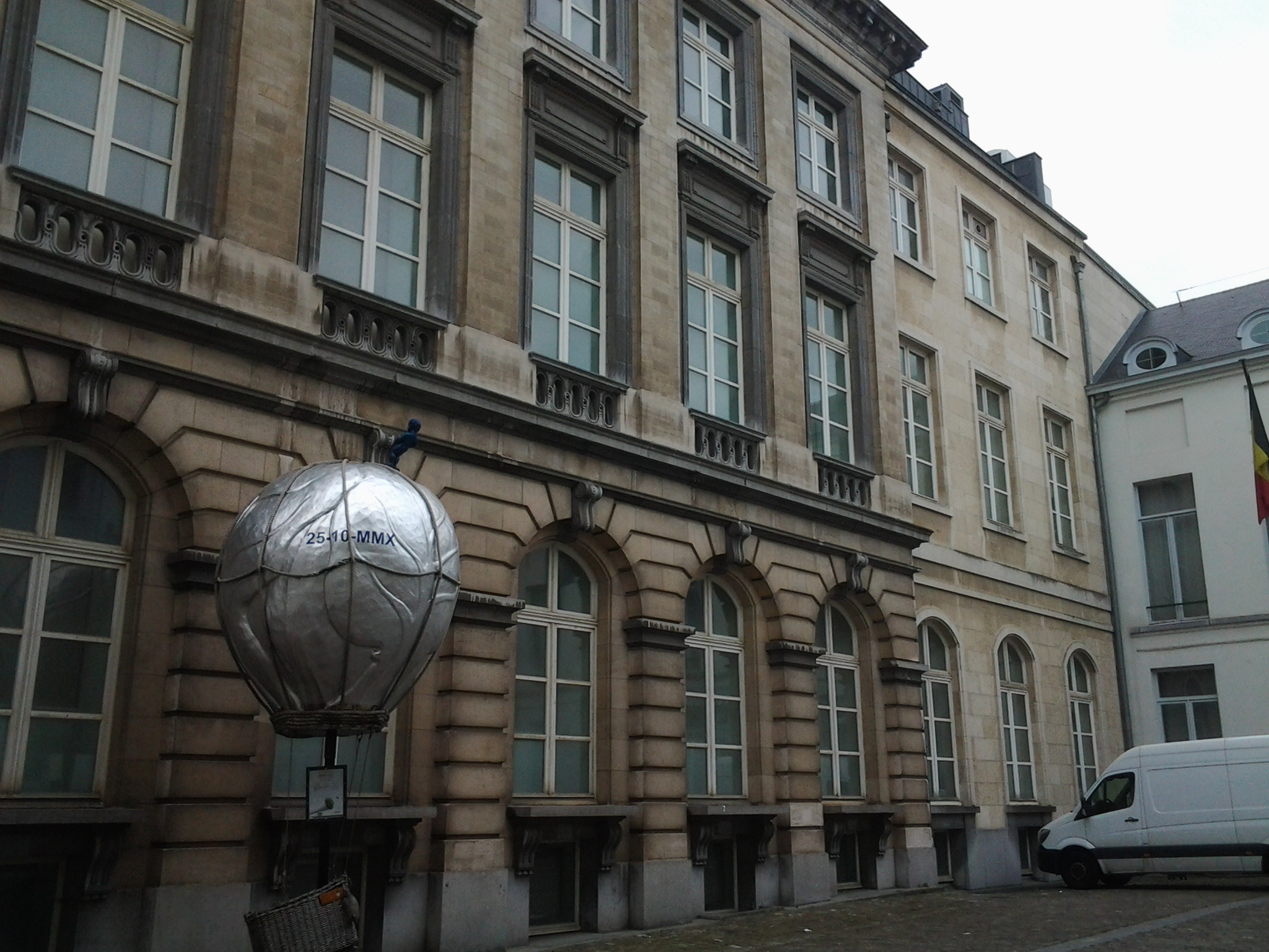 Façade de l'Hôtel de Spangen donnant sur la cour intérieure - juin 2016